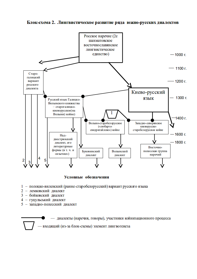 Блок-схема для статьи "Древнекиевский диалект"